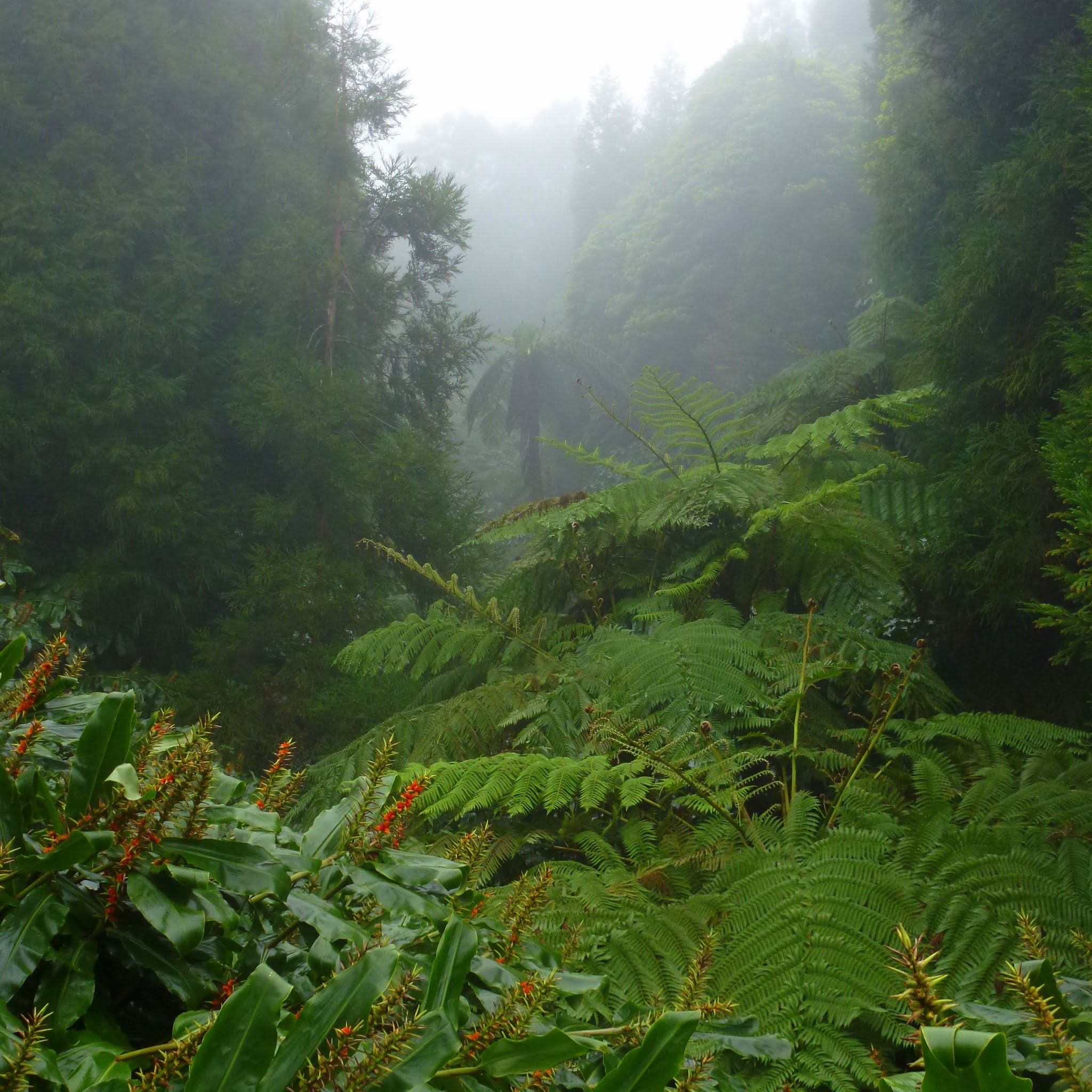 Caldeira Velha, São Miguel Island, Azores